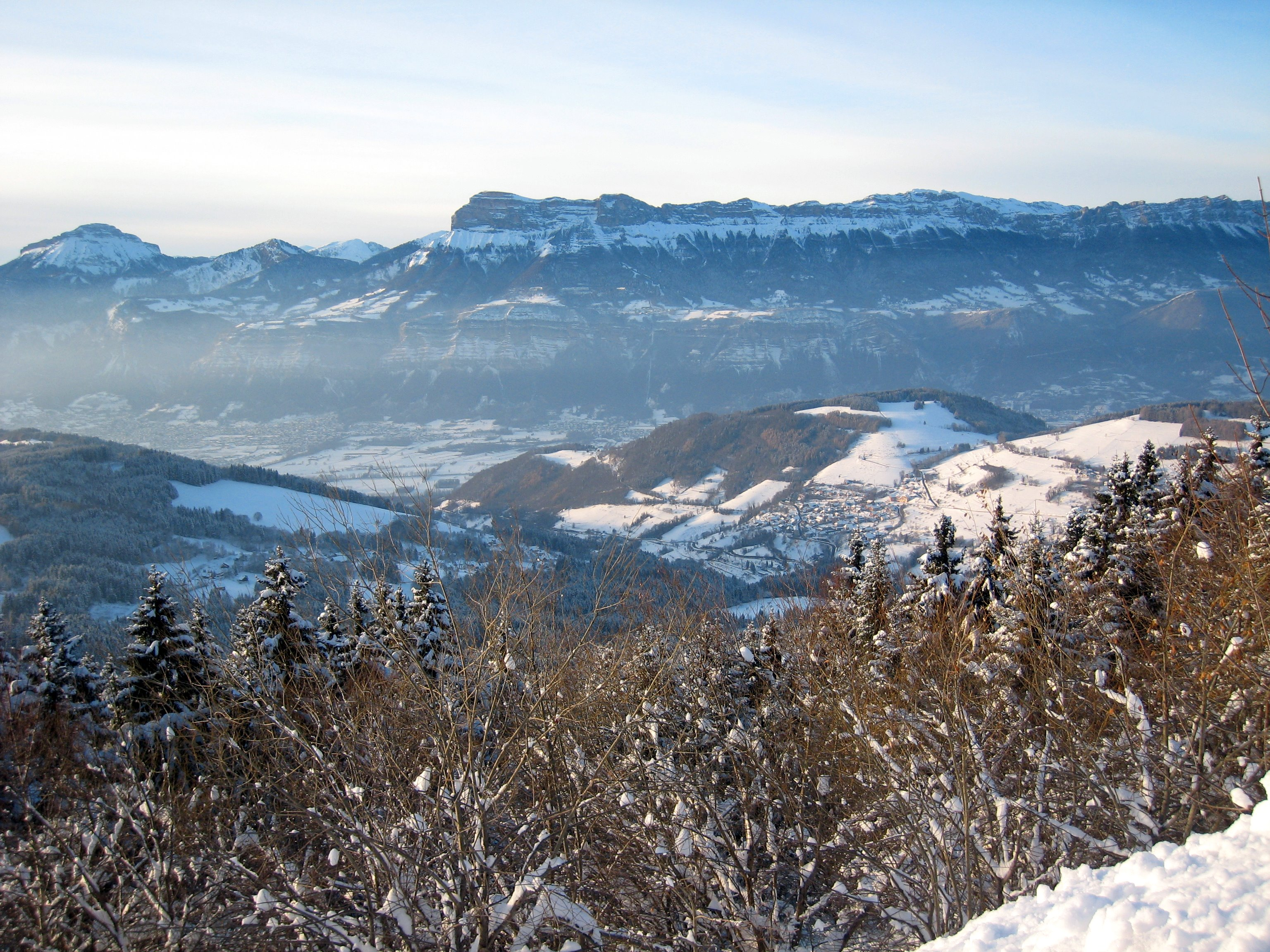 Les Adrets et la Chartreuse vus depuis Prapoutel - Les 7 Laux.